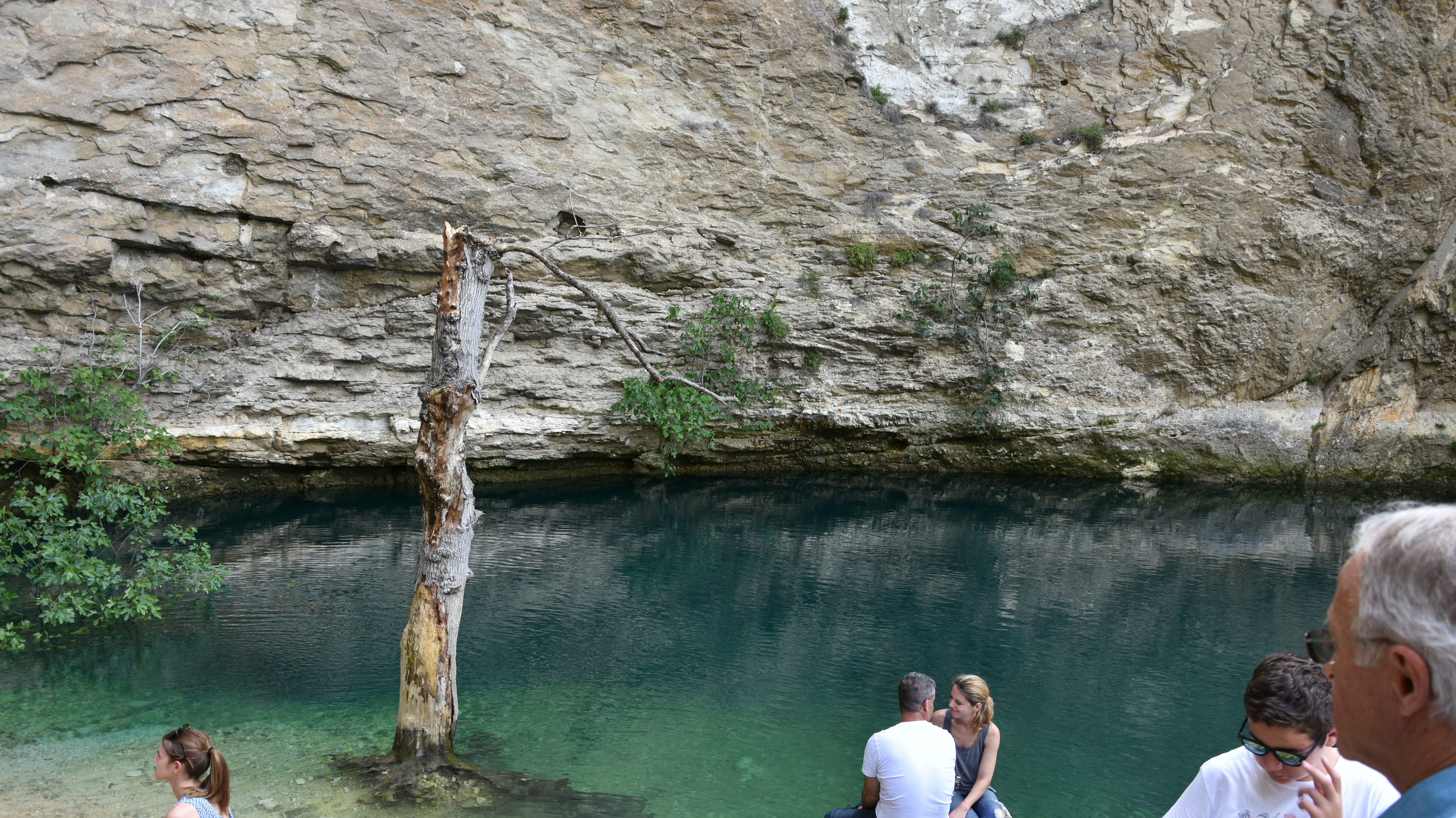 Resurgentie van de Sorgue (Fontaine de Vaucluse) - Fontaine-de-Vaucluse 27-05-2018 15-57-08